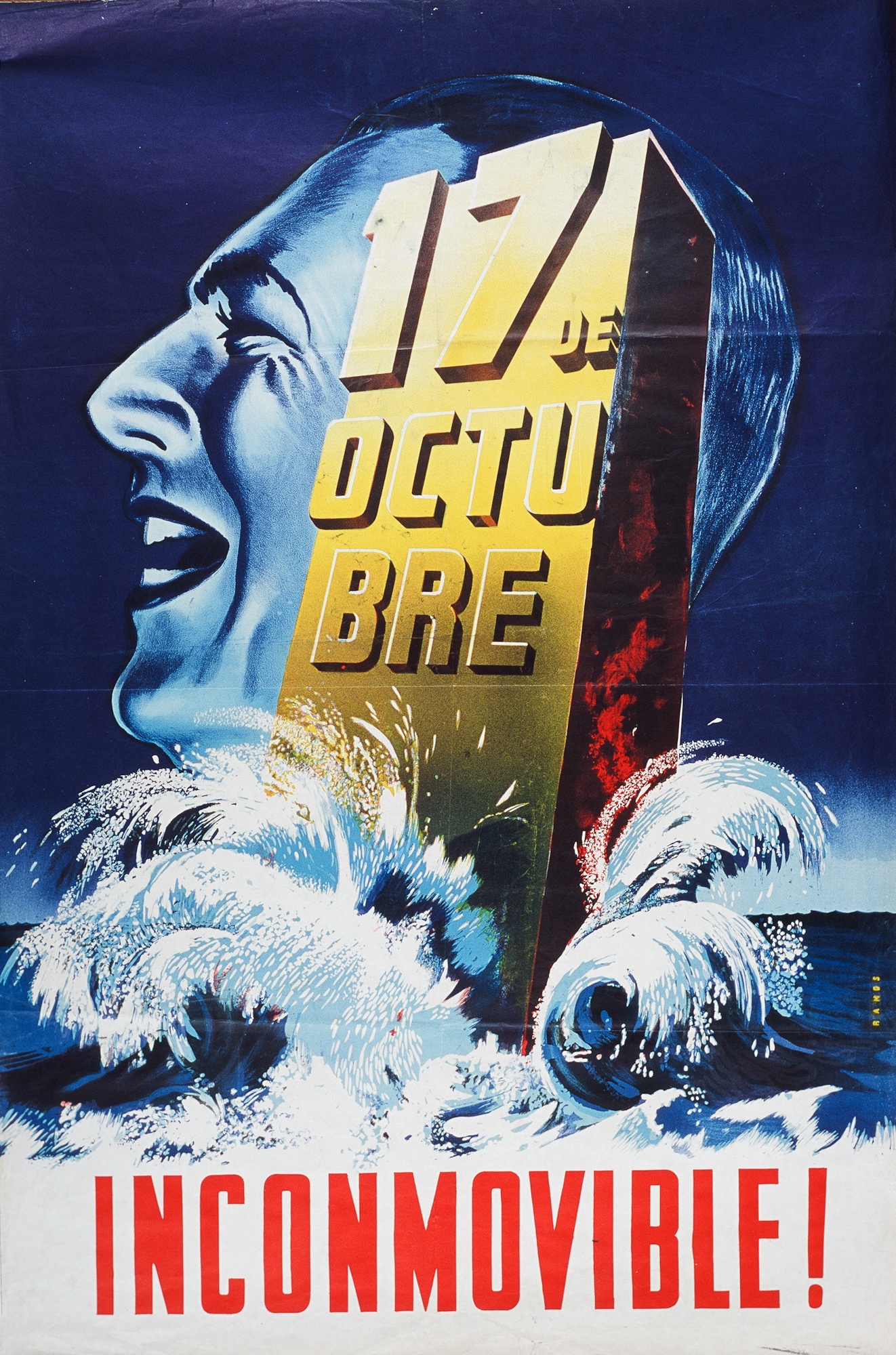 17 de octubre - Inconmovible. Afiche conmemorativo del segundo aniversario del Día de la Lealtad, conmemorado por primera vez en 1947.